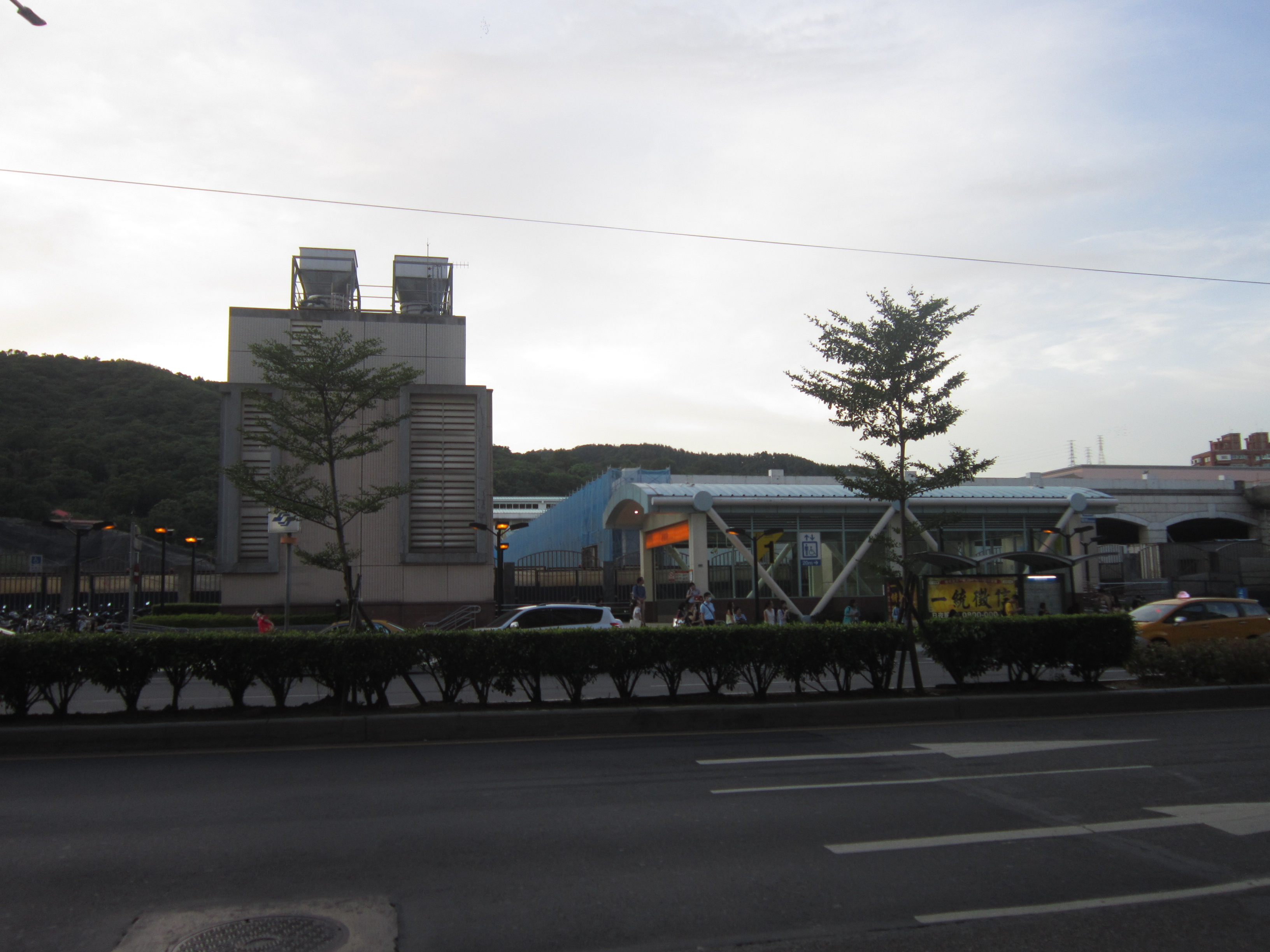 迴龍站1號出口後方的藍色圍籬是正在施工的新莊機廠(2016-8)